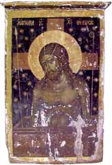 Russian icon «Man of sorrow». Двусторонняя икона «Христос во гробе» в иконографии «Страстотерпец», или «Муж скорби». На обороте «Распятие с предстоящими»